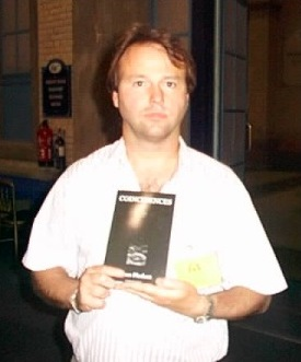 James Plaskett Categorie:Afbeelding schaker